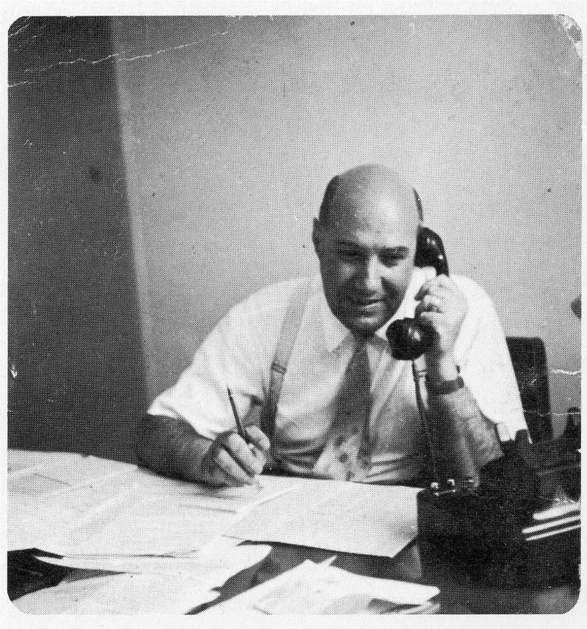 la foto ritrae Antonino Giuffrè al lavoro